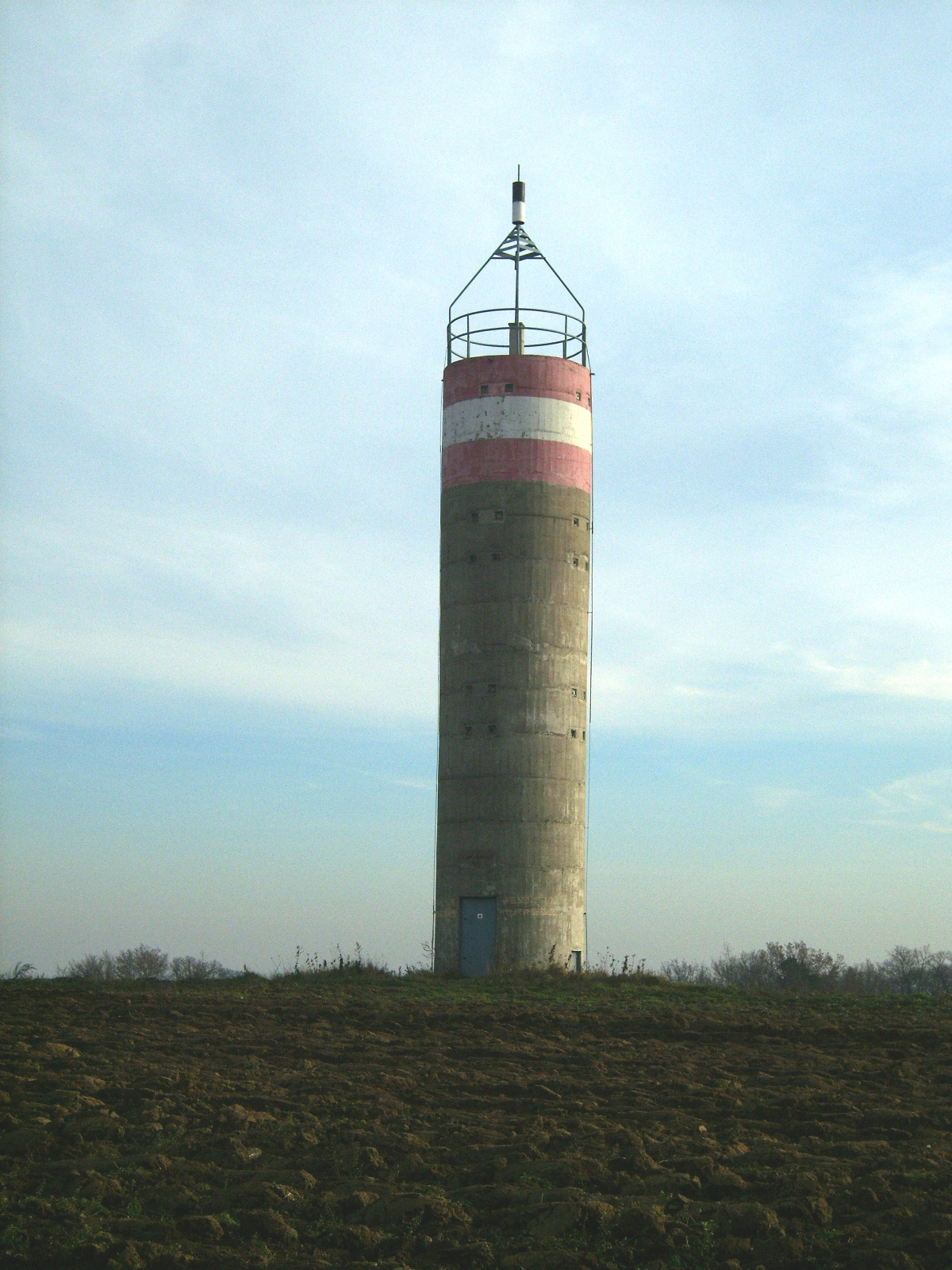 Kandikó, Göcsej, Zala-hills, Zala county, Hungary